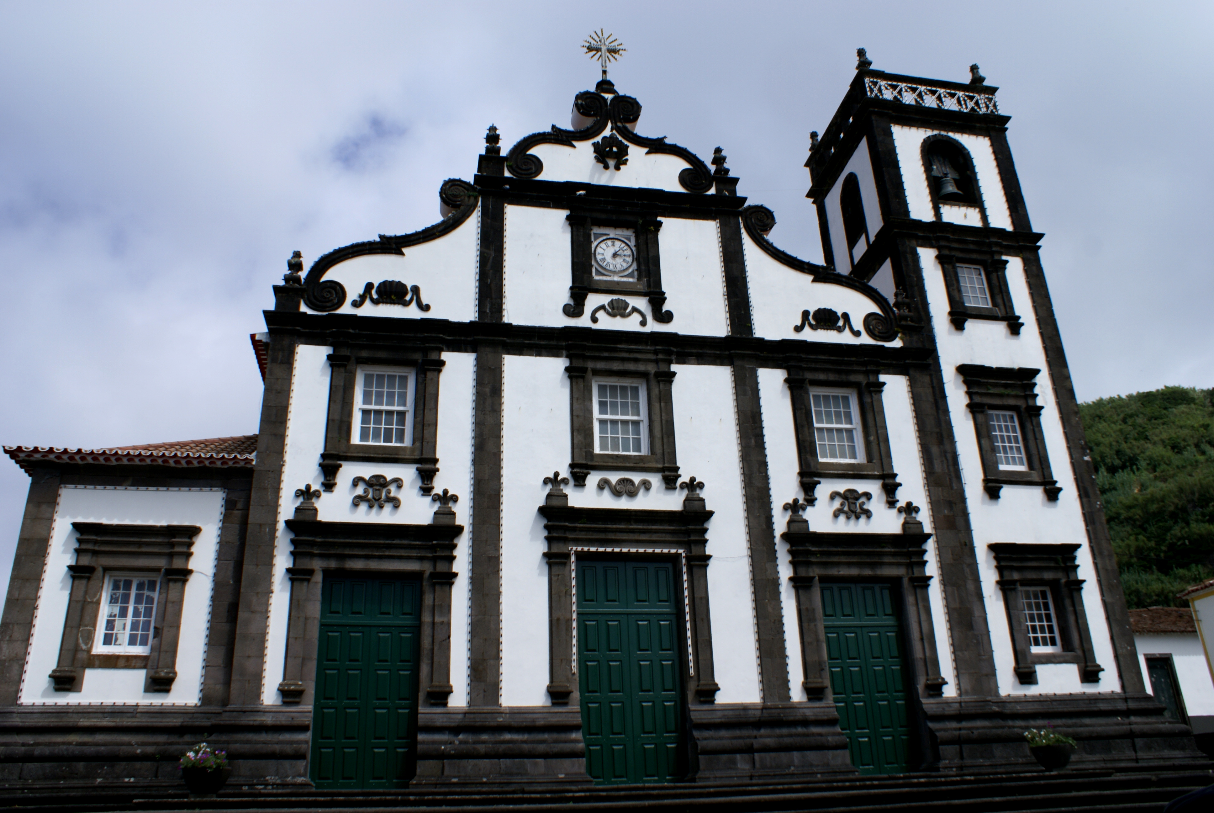 Igreja do Divino Espírito Santo (Maia), Ribeira Grande, ilha de São Miguel, Açores